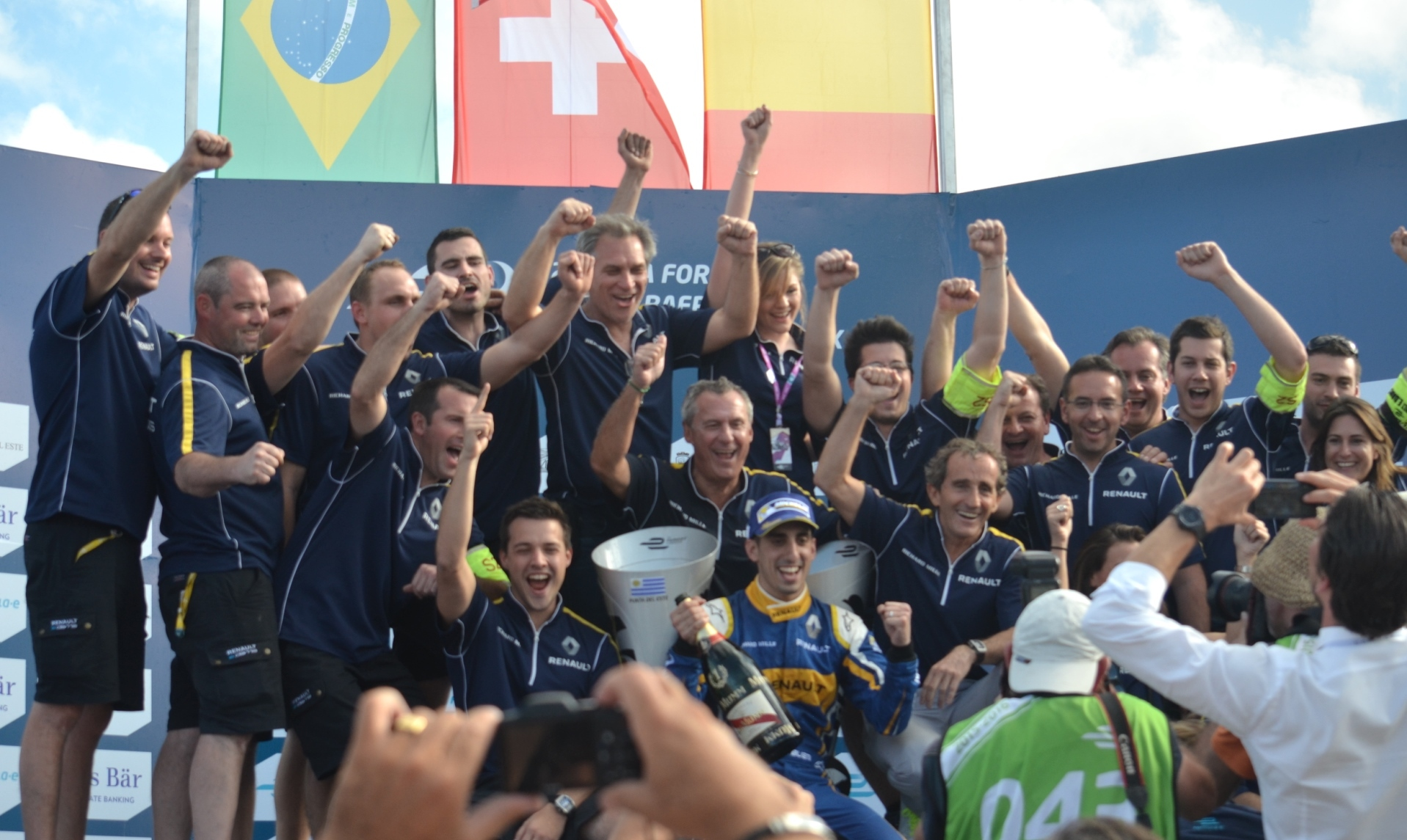 Solo se permite el uso de esta imagen mencionando a Velocidad Total como su autor. Imagen de la ceremonia de premiación del Punta del Este ePrix de 2015, en el podio ubicado en la Playa Brava.